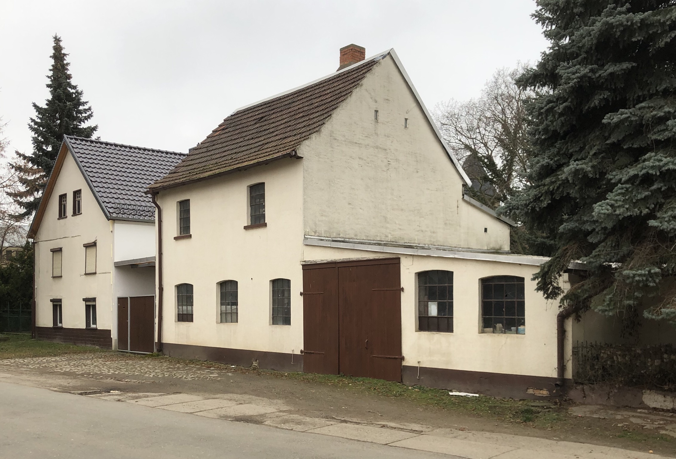 Klosteeschmiede Hedersleben